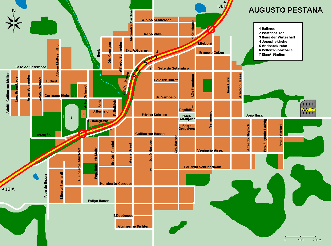 Karte der Stadt Augusto Pestana (Brasilien).